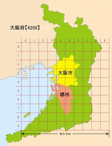 大阪圏の５ｋｍメッシュ